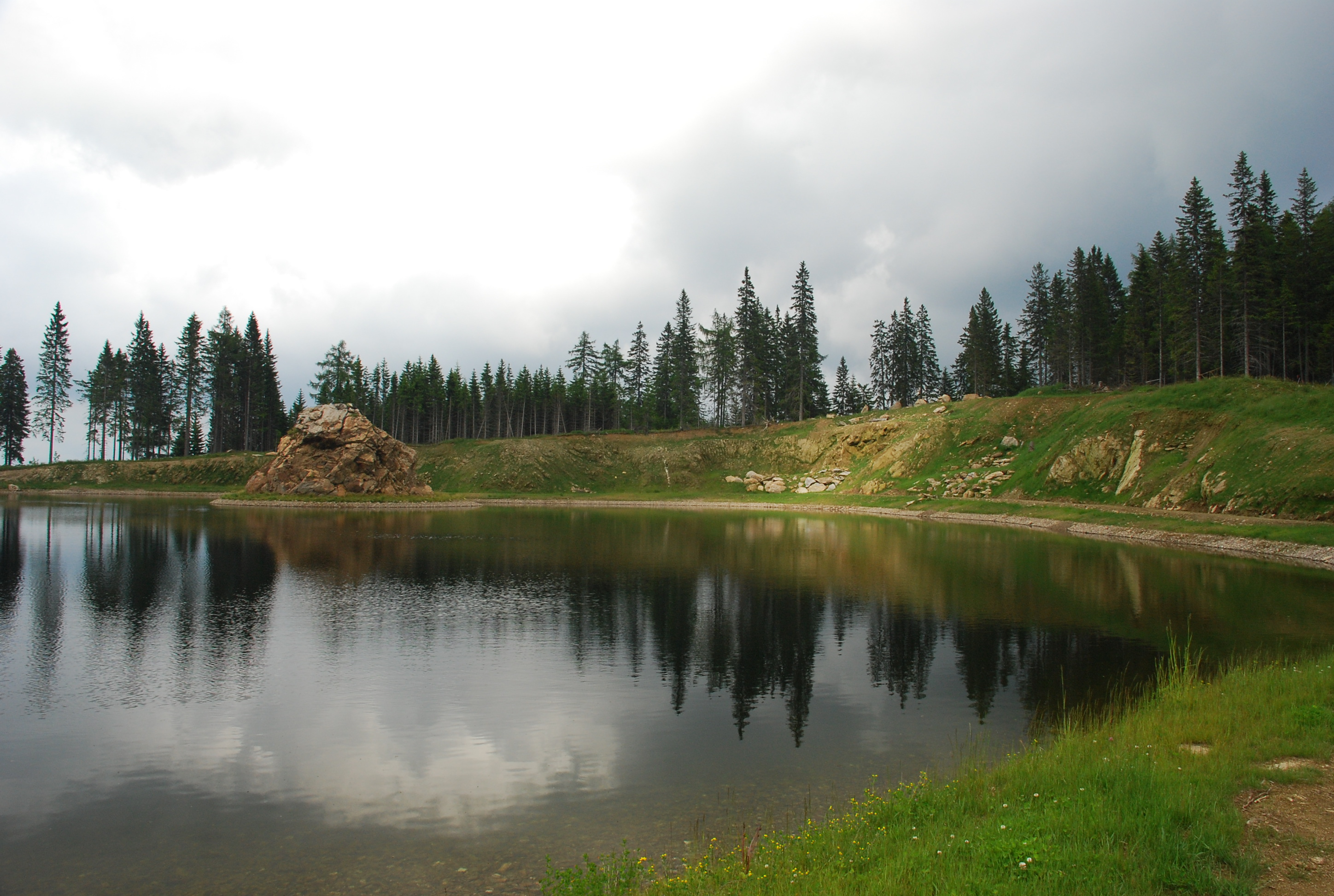 Löschwasser- und Schneeerzeugungsteich des Schigebietes Hebalm